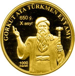 Памятная монета Туркменистана